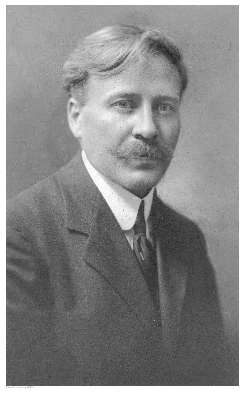 Янаки Моллов, български икономист и политик.